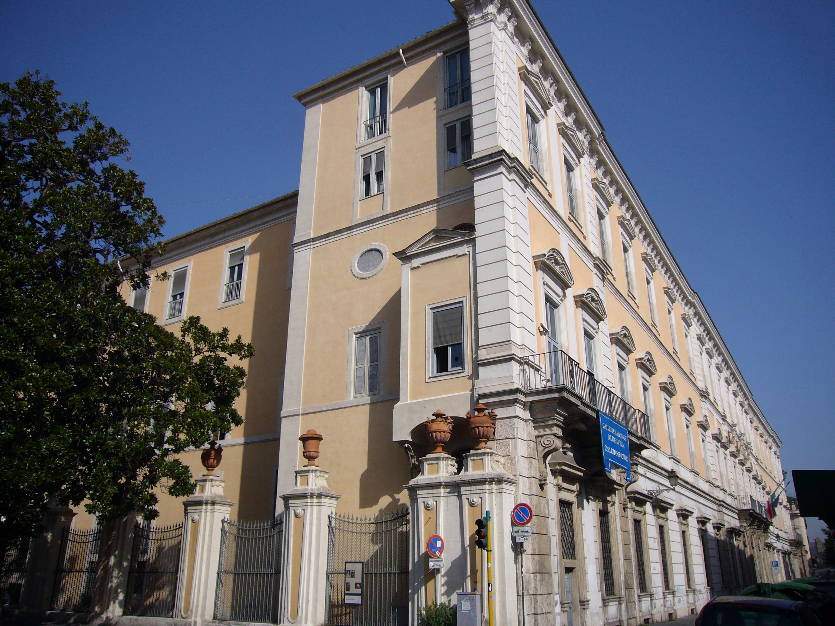 Roma, Palazzo Corsini alla Lungara, facciata